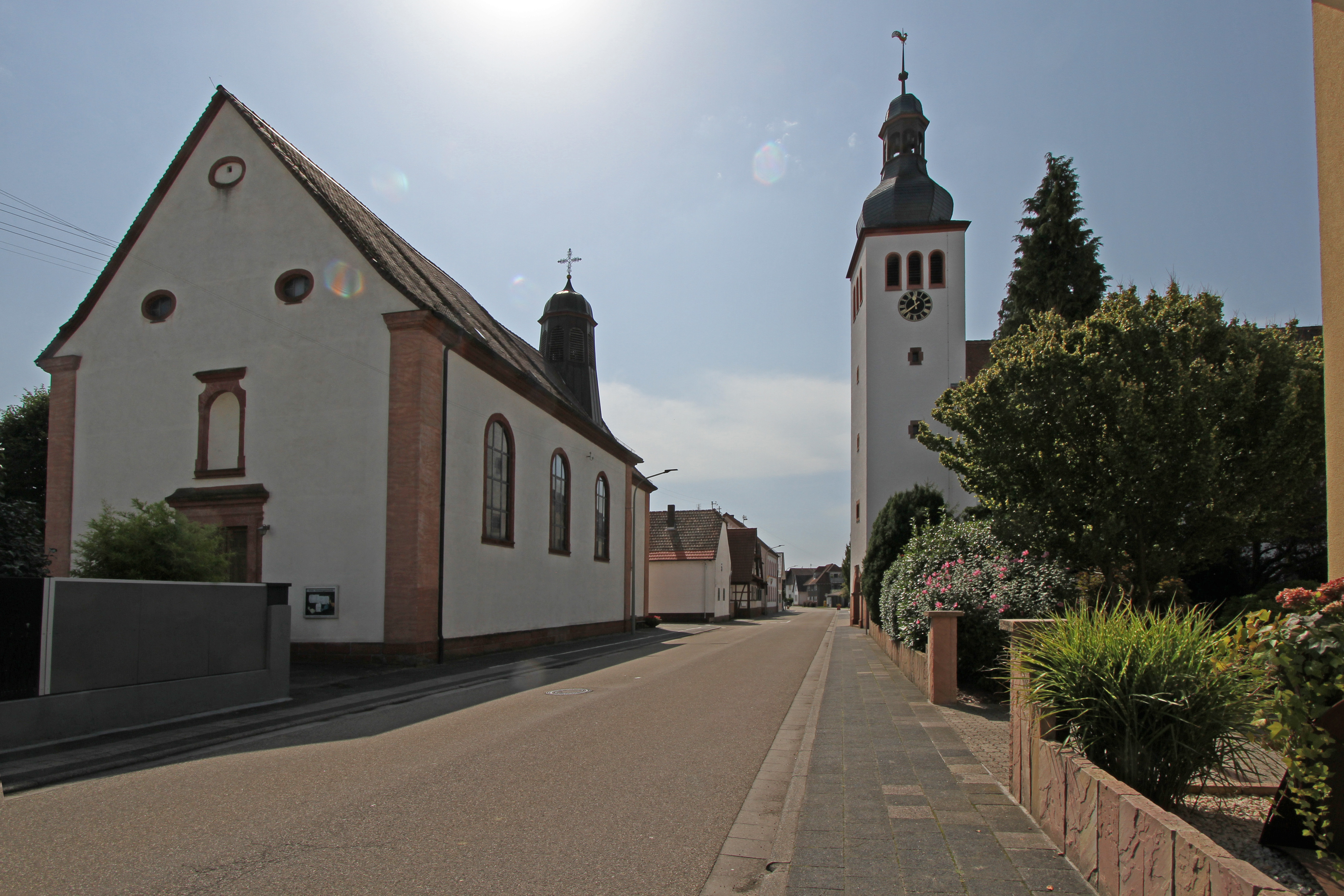 Kulturdenkmal in Neuburg am Rhein